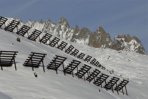 Lawinenverbauung auf Belalp